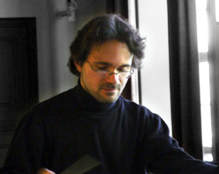 Kapellimestari Tuomas Turriago harjoituksissa Vanhalla kirjastotalolla Tampereella.